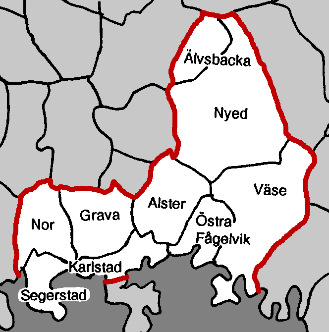 Old municipalities in Karlstad